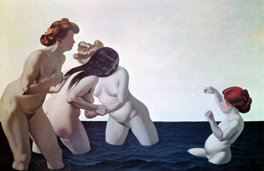 Trois femmes et une petite fille jouant dans l'eau, Bâle, Kunstmuseum Basel, acquis grâce au Birmann-Fonds, 1957